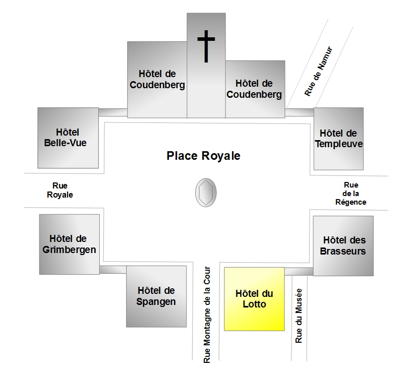 Belgique - Bruxelles - Plan de la place Royale - Hôtel du Lotto